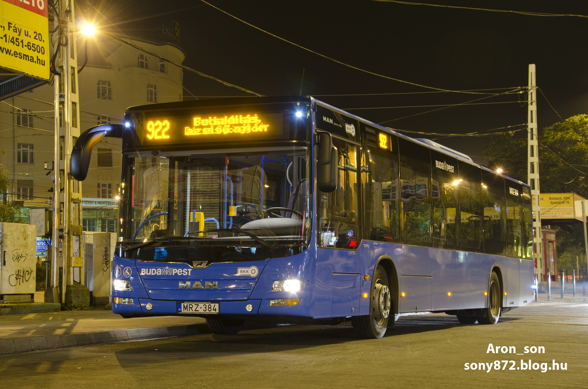 922-es jelzésű MAN A21 Lion's City busz a Széll Kálmán téren (frsz. MRZ-384)